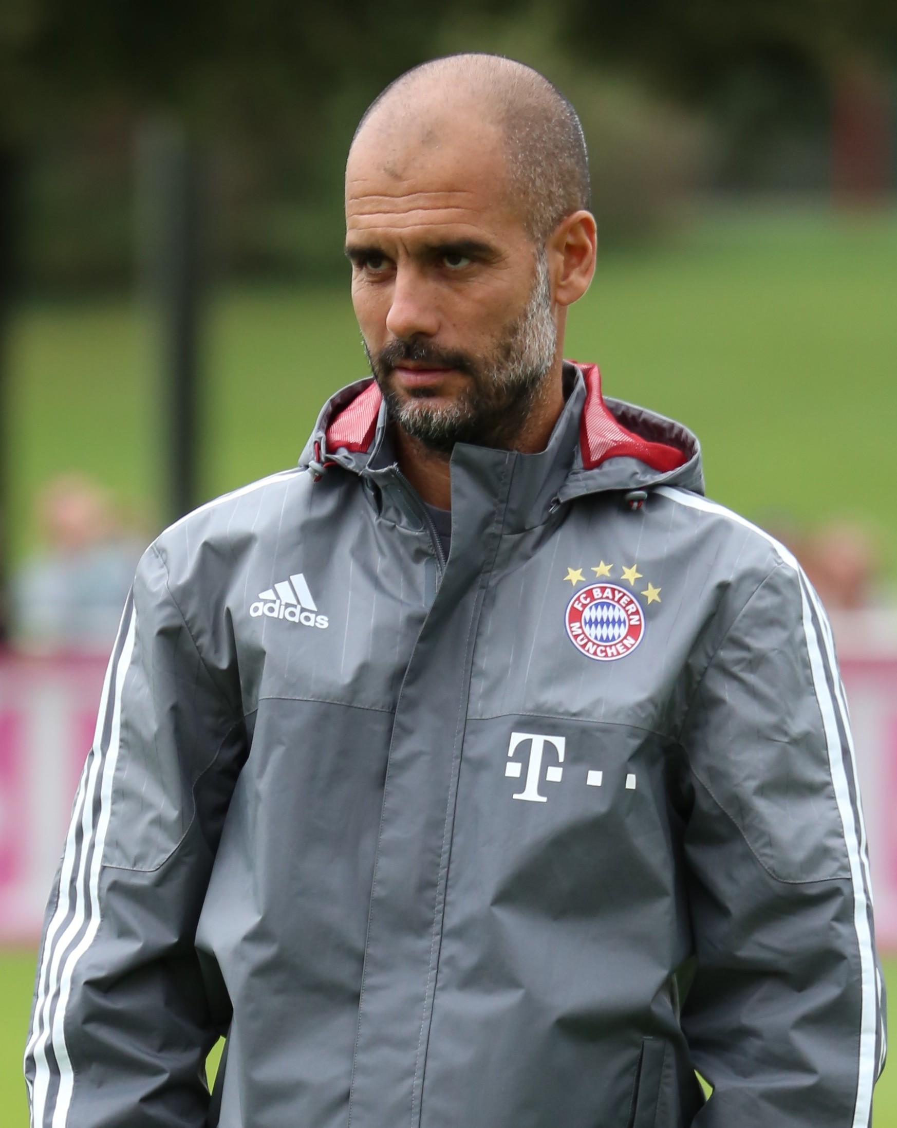 Pep Guardiola, Trainer, beim Training auf dem Gelände des FC Bayern München